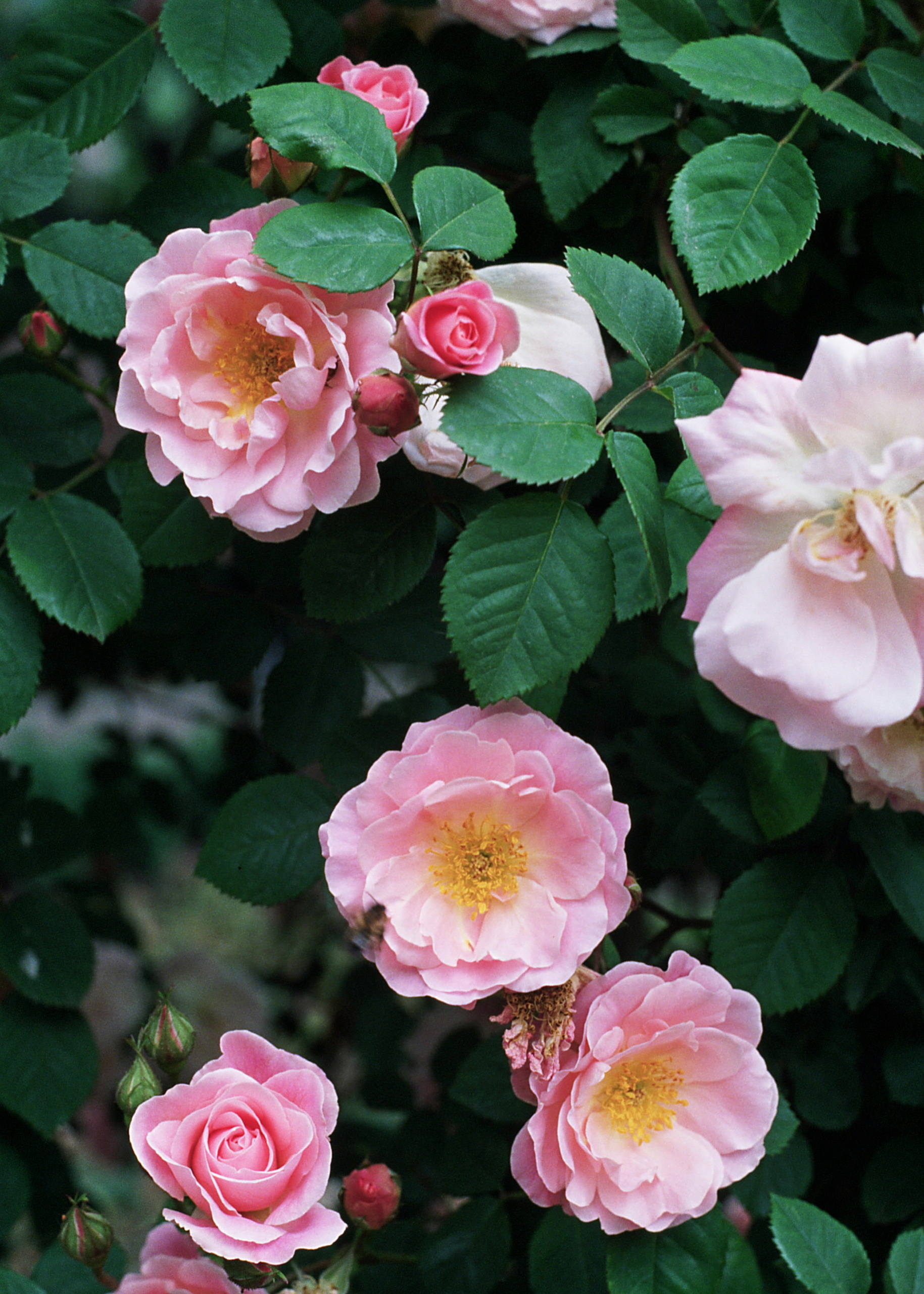 Rosa 'Fritz Nobis', sect. Synstylae. Real Jardín Botánico, Madrid